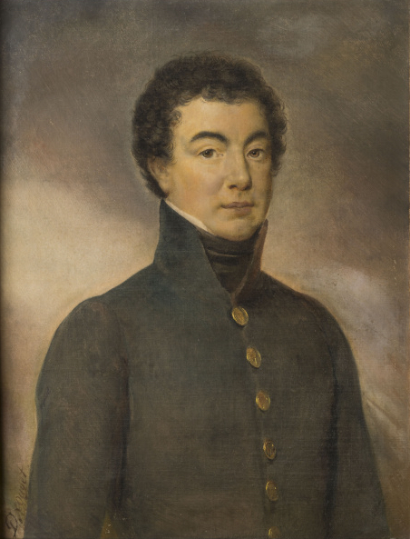 Commandé par Louis-Philippe pour le musée historique de Versailles en 1835